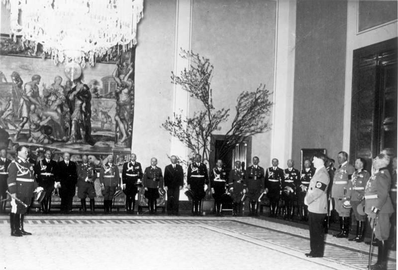 Scherl: Die Gratulation der Reichsregierung im großen Empfangssaal der Neuen Reichskanzlei Um 09:45 Uhr gratulierte die Reichsregierung mit den Staatssekretären der einzelnen Ministerien dem Führer. Ministerpräsident Hermann Göring war ihr Sprecher. Unser Bild zeigt rechts den Führer während der Glückwunschansprach des Generalfeldmarschalls. Rechts von Adolf Hitler Staatsminister Dr. Otto Meißner. ADN-ZB/Archiv: Faschistisches Deutschland 1933-1945 Hitlers 50. Geburtstag: Am 20.4.1939 um 9.45 Uhr überbrachte die faschistische Reichsregierung zusammen mit den Staatssekretären der einzelnen Ministerien Hitler ihre Glückwünsche zum 50. Geburtstag im Großen Empfangssaal der Neuen Reichskanzlei, Ministerpräsident Generalfeldmarschall Hermann Göring war ihr Sprecher